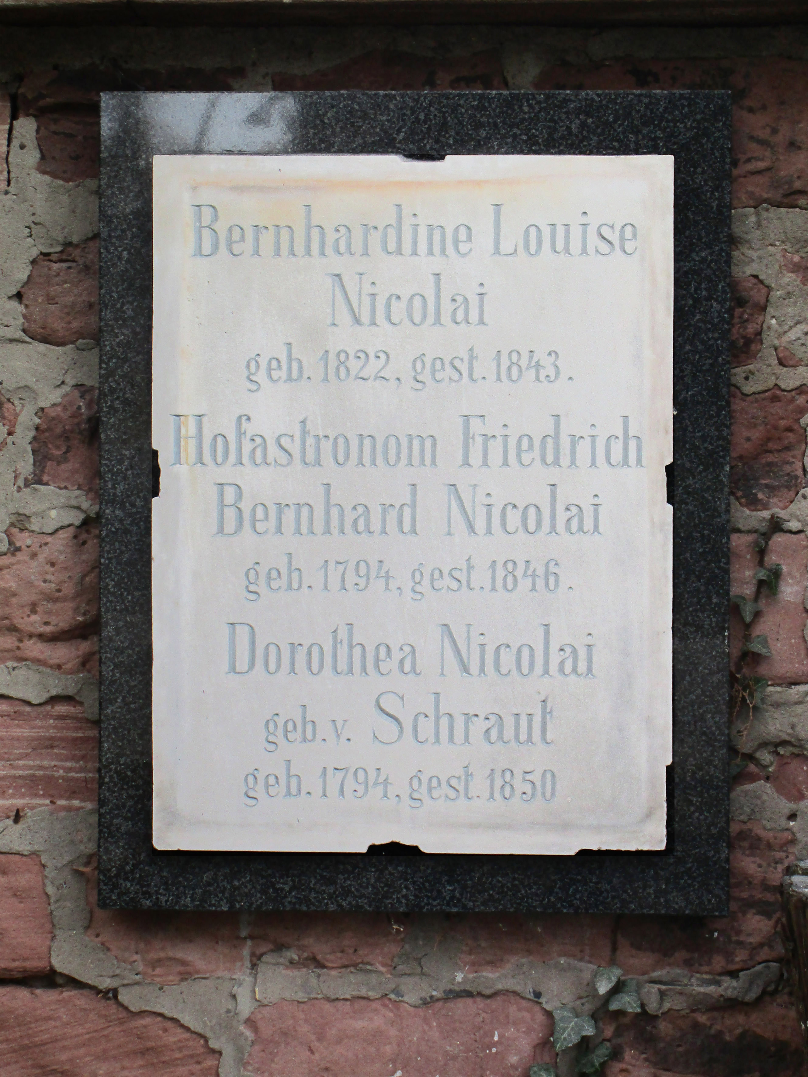 Die Grabplatte wurde von mir gereinigt.